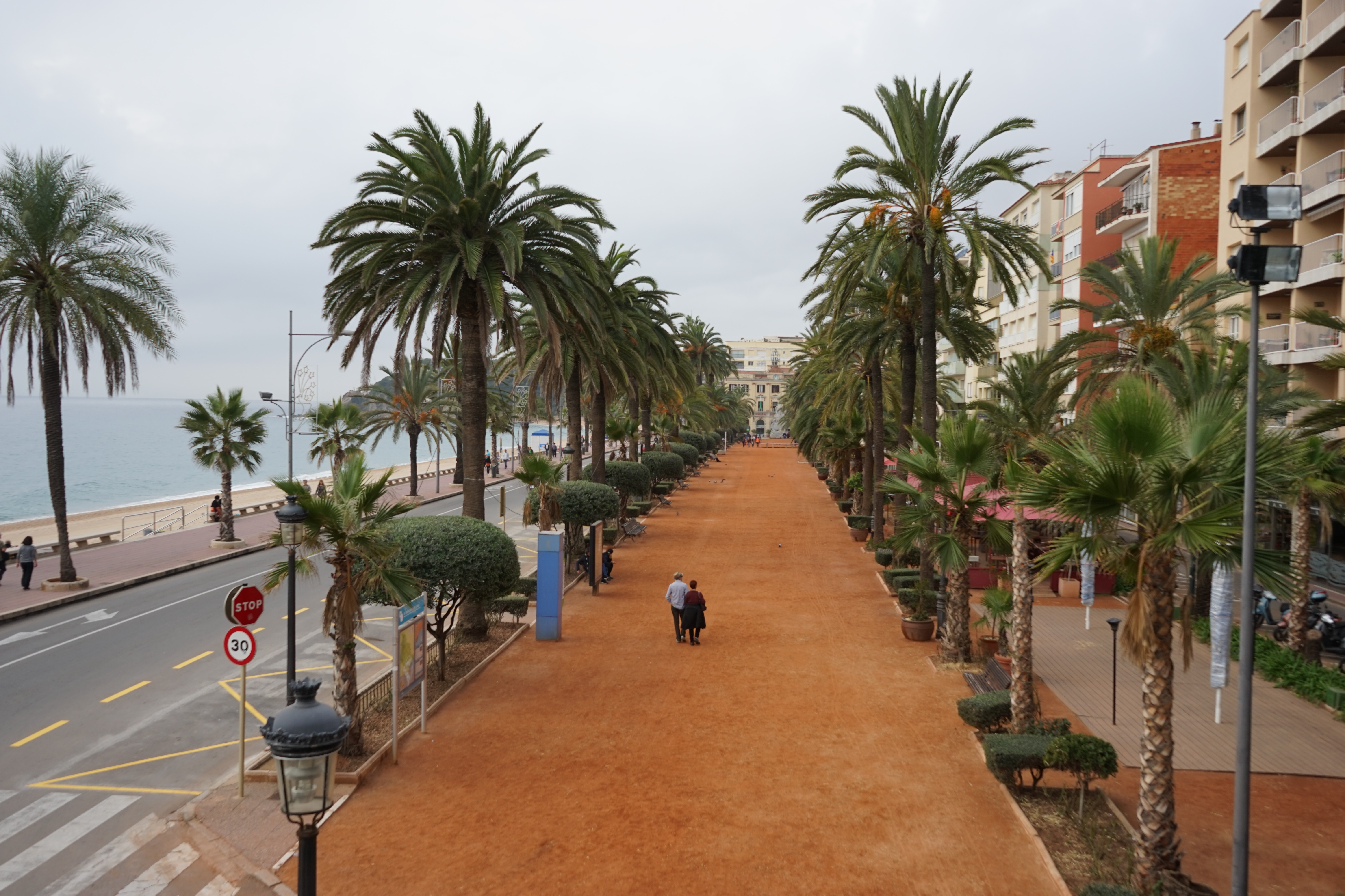 Passeig Mossèn Cinto Verdaguer (Lloret de Mar)